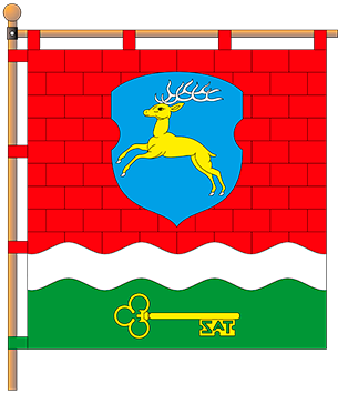 Прапор Сатанова